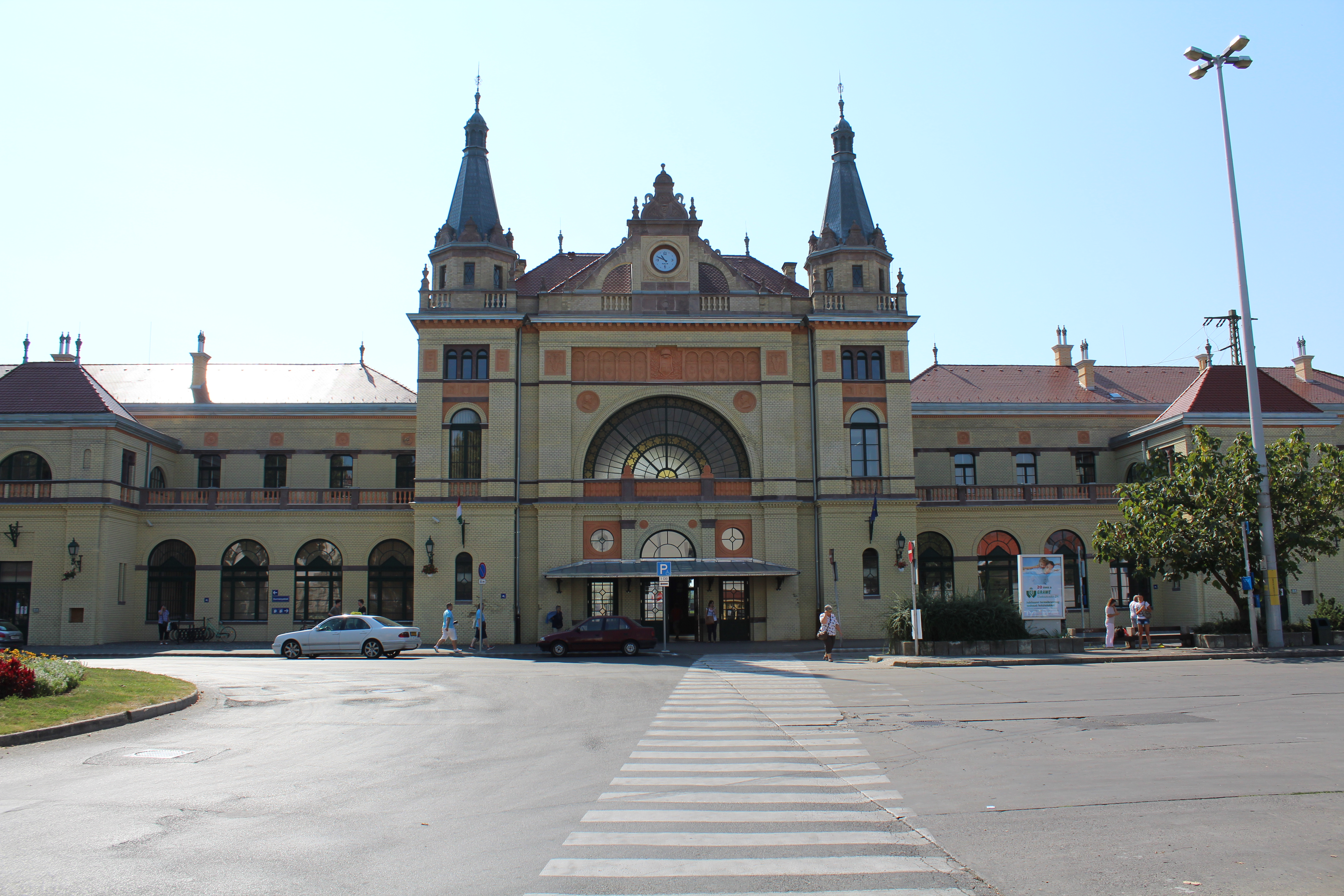 A pécsi pályaudvar 2016-ban.